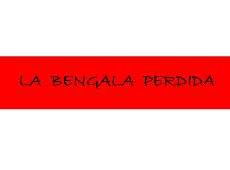 Réplica de la bandera de River diseñada por Eduardo Dylan Martí en octubre de 2012, exhibida en la muestra "Los Libros de la Buena Memoria" en homenaje a Luis Alberto Spinetta en la Biblioteca Nacional.